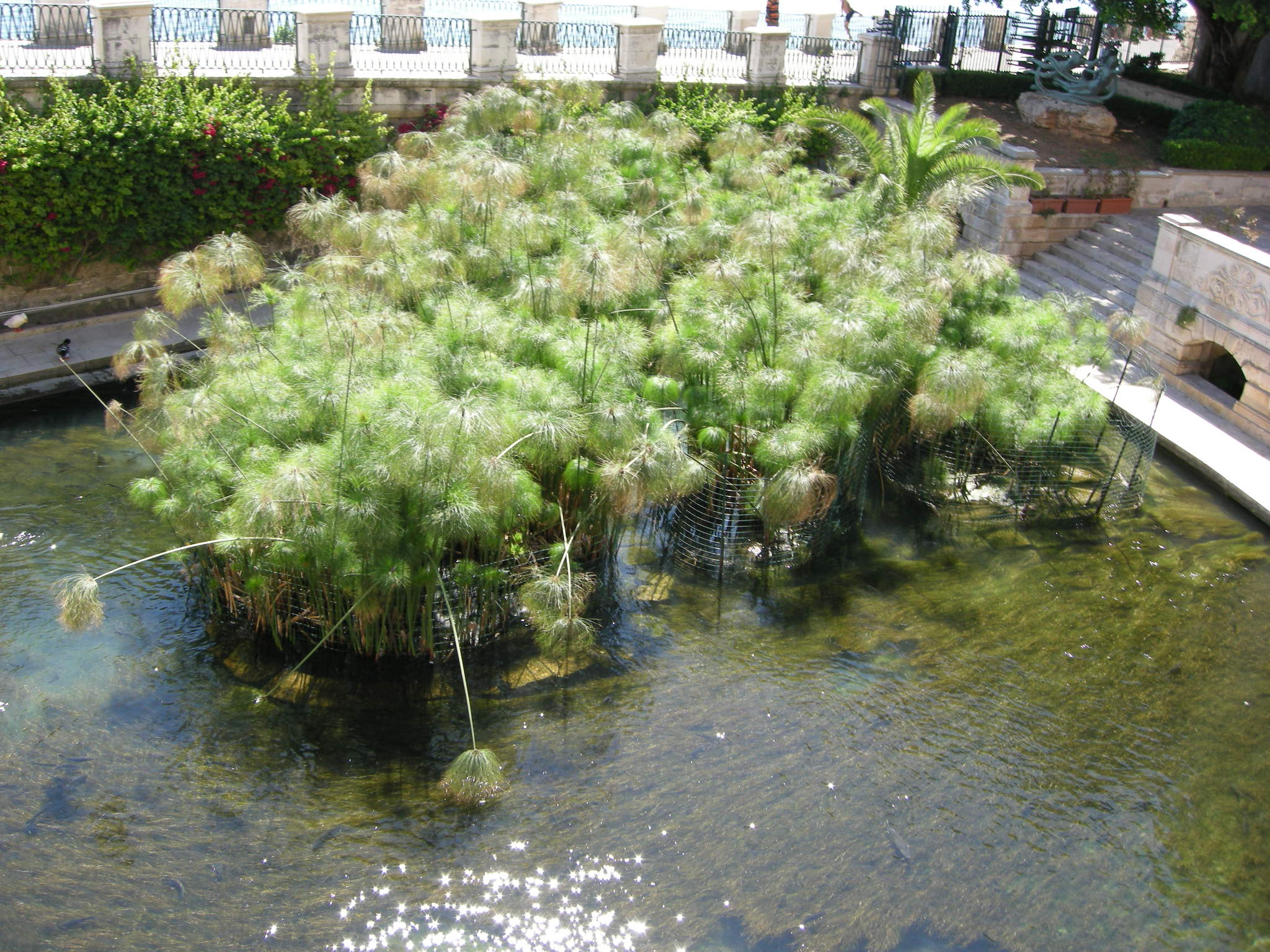 Ortigia, fonte aretusa